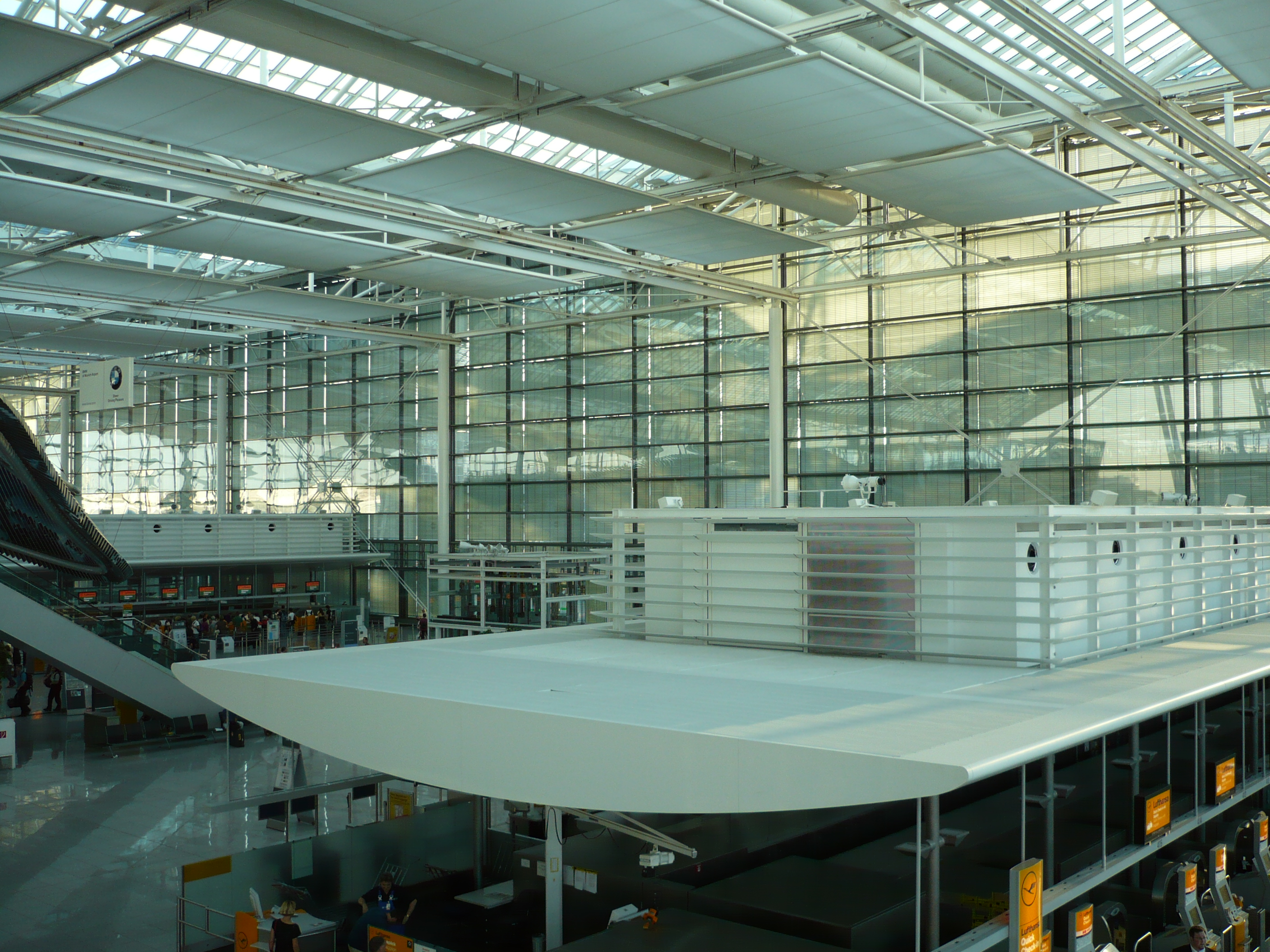 Check-In-Bereich im Terminal 2 des Flughafens München